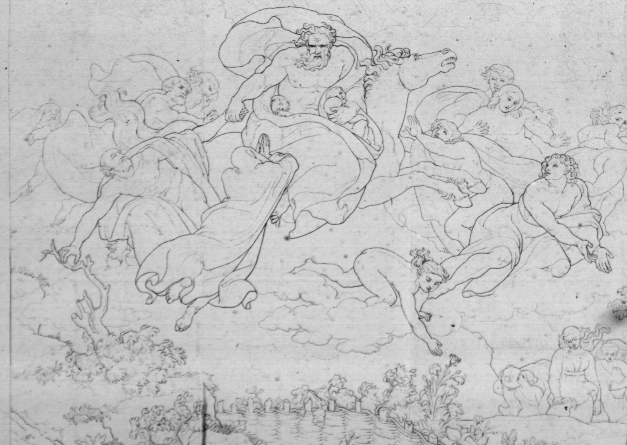 Beitrag zum bildnerischen Wettbewerb zu Goethes neugriechischem Gedicht „Charon“.